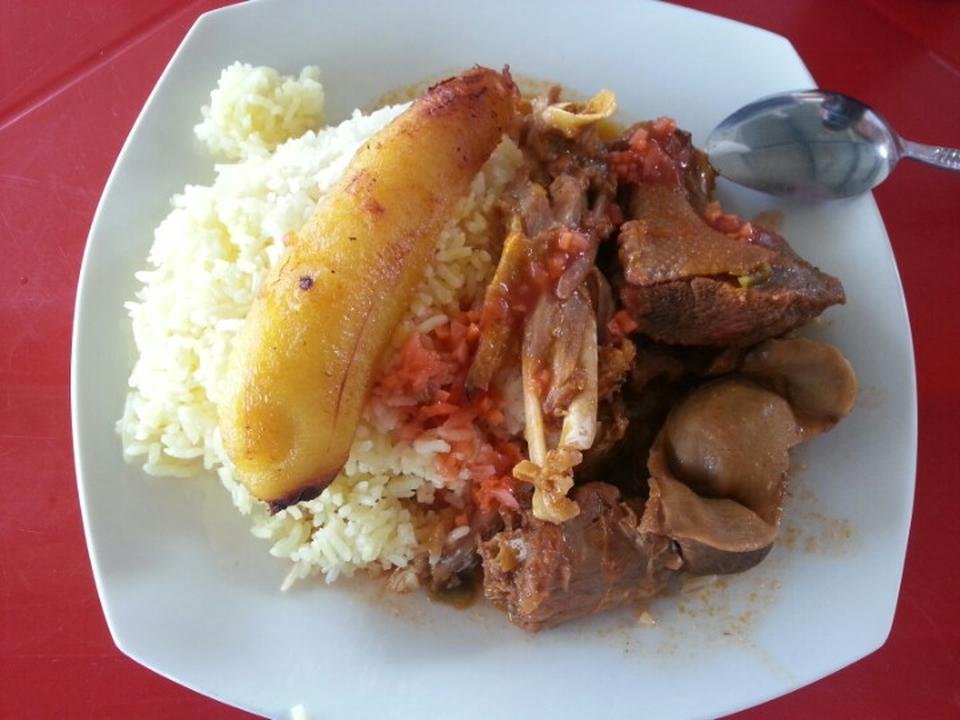 Zapotal (Santa Elena) Seco de chivo, plato típico especialidad de Zapotal